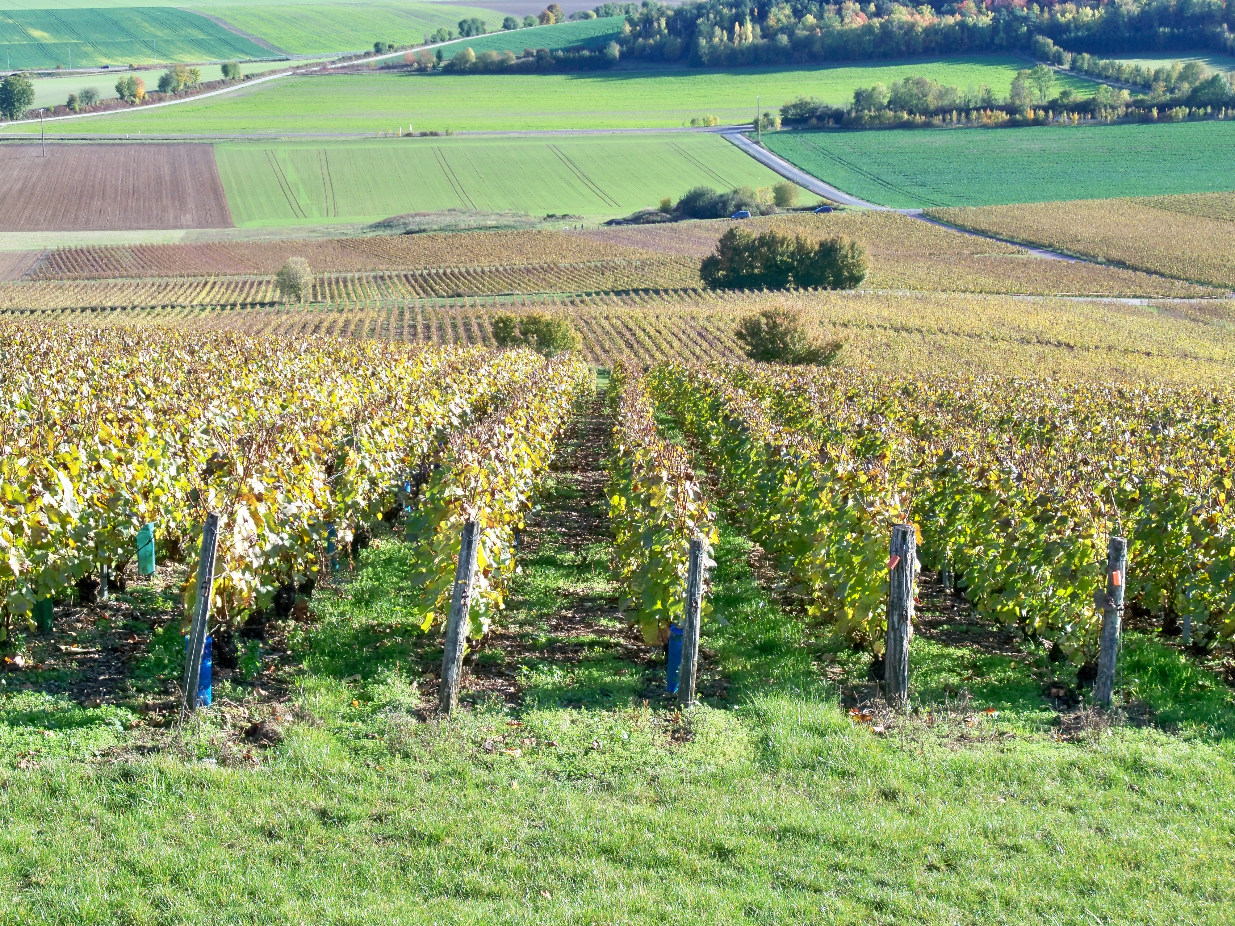 Le vignoble champenois à Montgueux, dans l'Aube